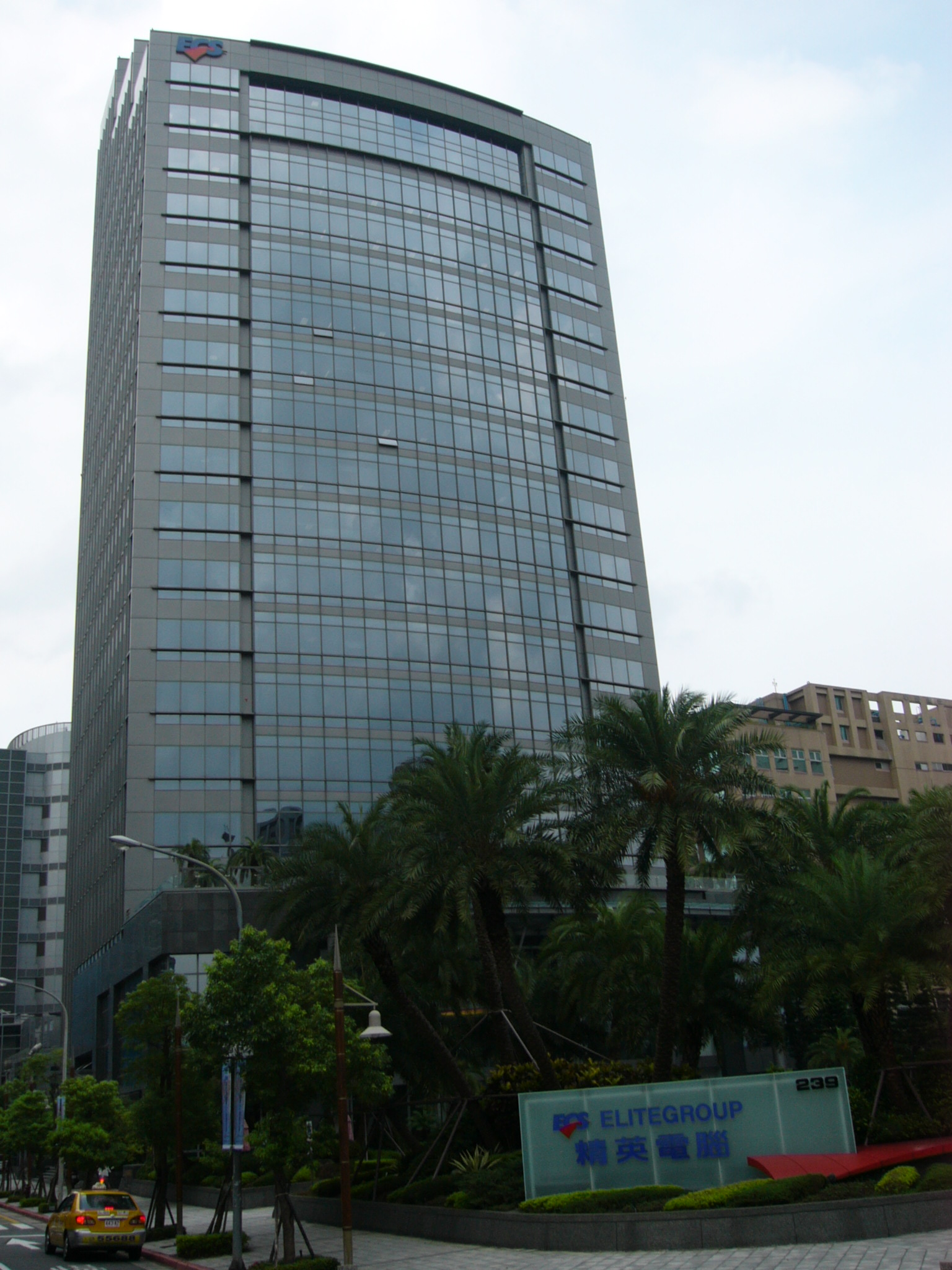 精英電腦總部大樓正面外觀。